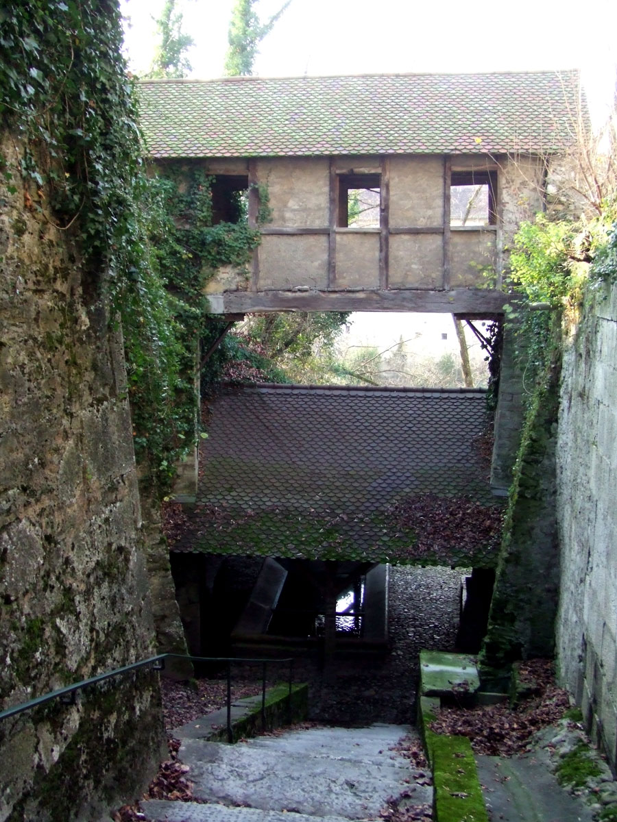 Passage des Carmes et source Saint-Félix - Pont de Beauvoisin (Savoie) - France